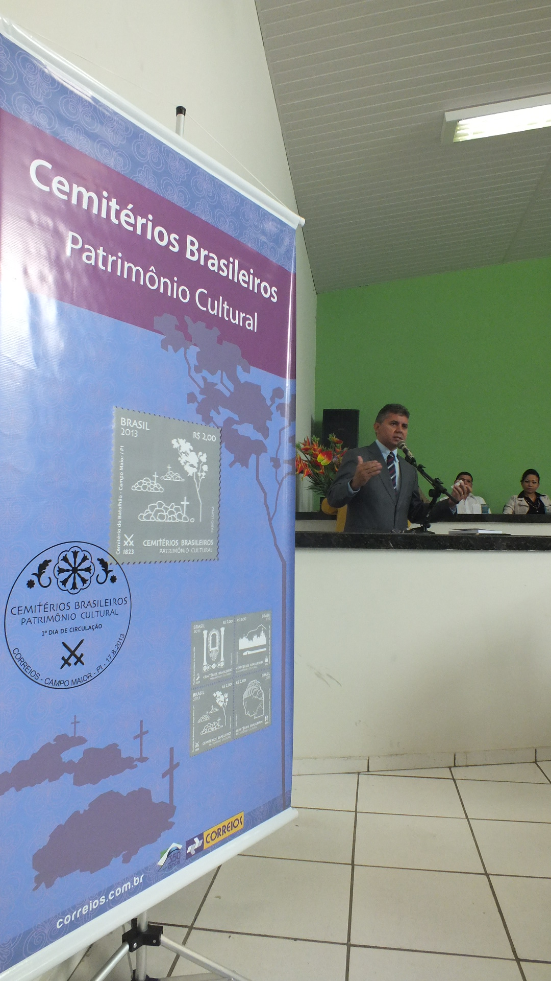 Prefeito de Campo Maior (Piauí) Paulo César Martins na ceromônia de lançamnto do selo postal Cemitério do Batalhão na câmara Municipal de Campo Maior, estado do Piauí